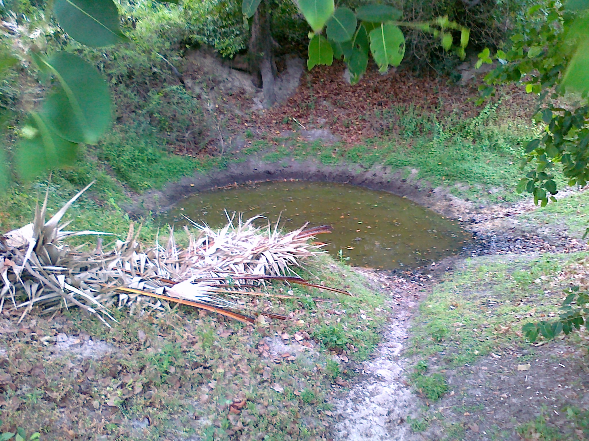 கச்சாய் நீர் வளம்